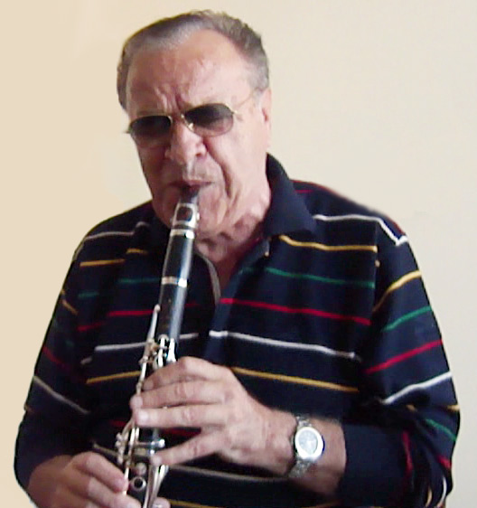 Božidar Boki Milošević